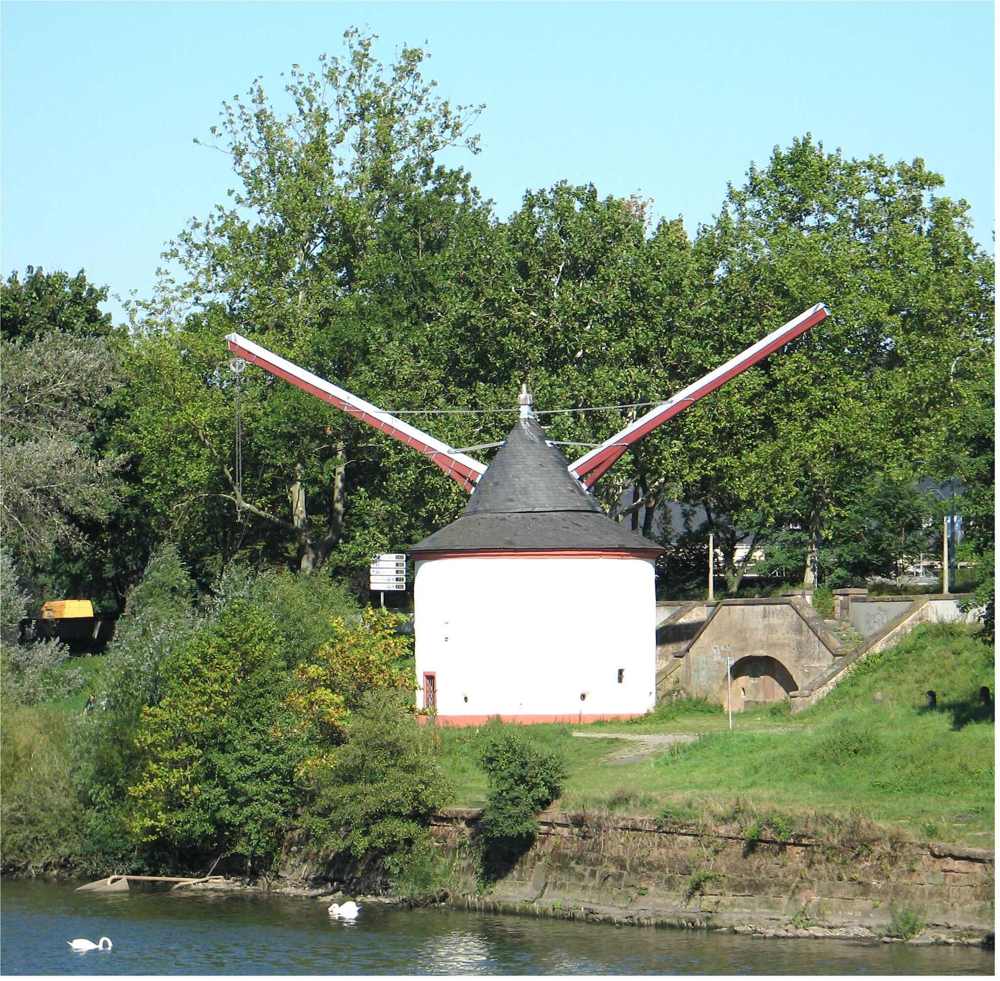 Historesche Kran zu Tréier laanscht d'Musel Kategorie:Tréier